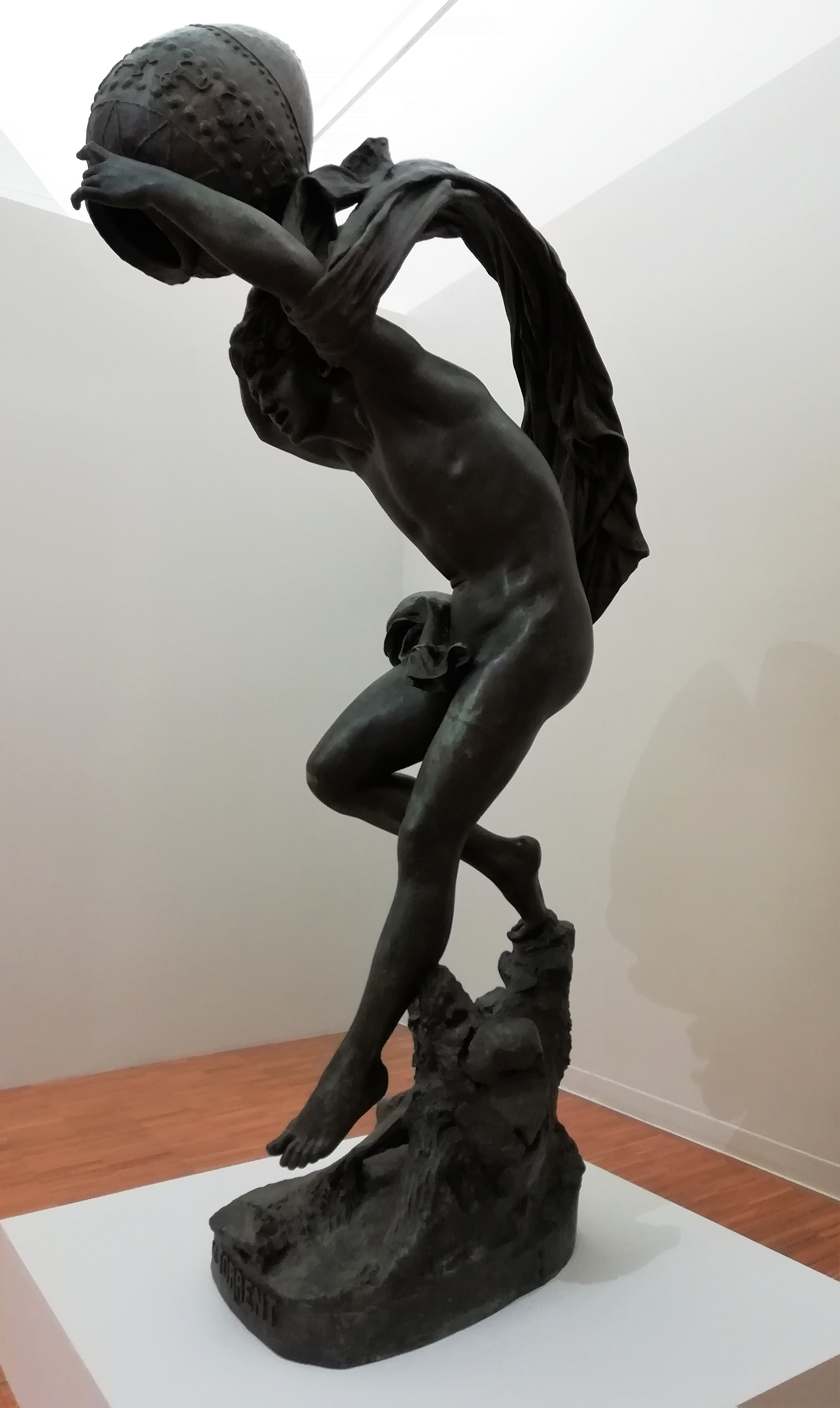 Urbain Basset (Grenoble, 1842 - Bernin, 1924), Le Torrent, 1878, fontaine en bronze, Dépôt de l'Etat en 1878. Salon de Paris (1878). Urbain Basset expose une épreuve en plâtre du Torrent, projet de fontaine en 1876, au Salon de Paris. Il emprunte pour réaliser sa sculpture Le Torrent de 2,5 mètres de hauteur, et il la présente au Salon de Paris en 1878. Elle est donc acquise par l'État et envoyée au musée de Grenoble. Elle est installée en place de la Constitution (place Verdun aujourd'hui) en 1884. Le Torrent est posée au Jardin de ville en 1888. En 1942, la fontaine est envoyée en Allemagne pour en récupérer le bronze, mais elle échappe à la fonte et en 1950 est à nouveau à Grenoble. Elle est réinstallés dans le Jardin de Ville en 1985. Le Torrent est symbolisé par un jeune homme qui tient sur sa tête une cruche ornée des signes du zodiaque, sauf le Verseau (déjà représenté par la statue). Informations tirées de la plaquette de l'Exposition temporaire "Grenoble et ses artistes au XIXe siècle" au Musée de Grenoble. (Plusieurs versions réduites reproduisent le même sujet.) Selon une source, Basset se serait inspiré de la cascade de Craponoz pour la sculpture Le Torrent, intitulée aussi Le Verseau.